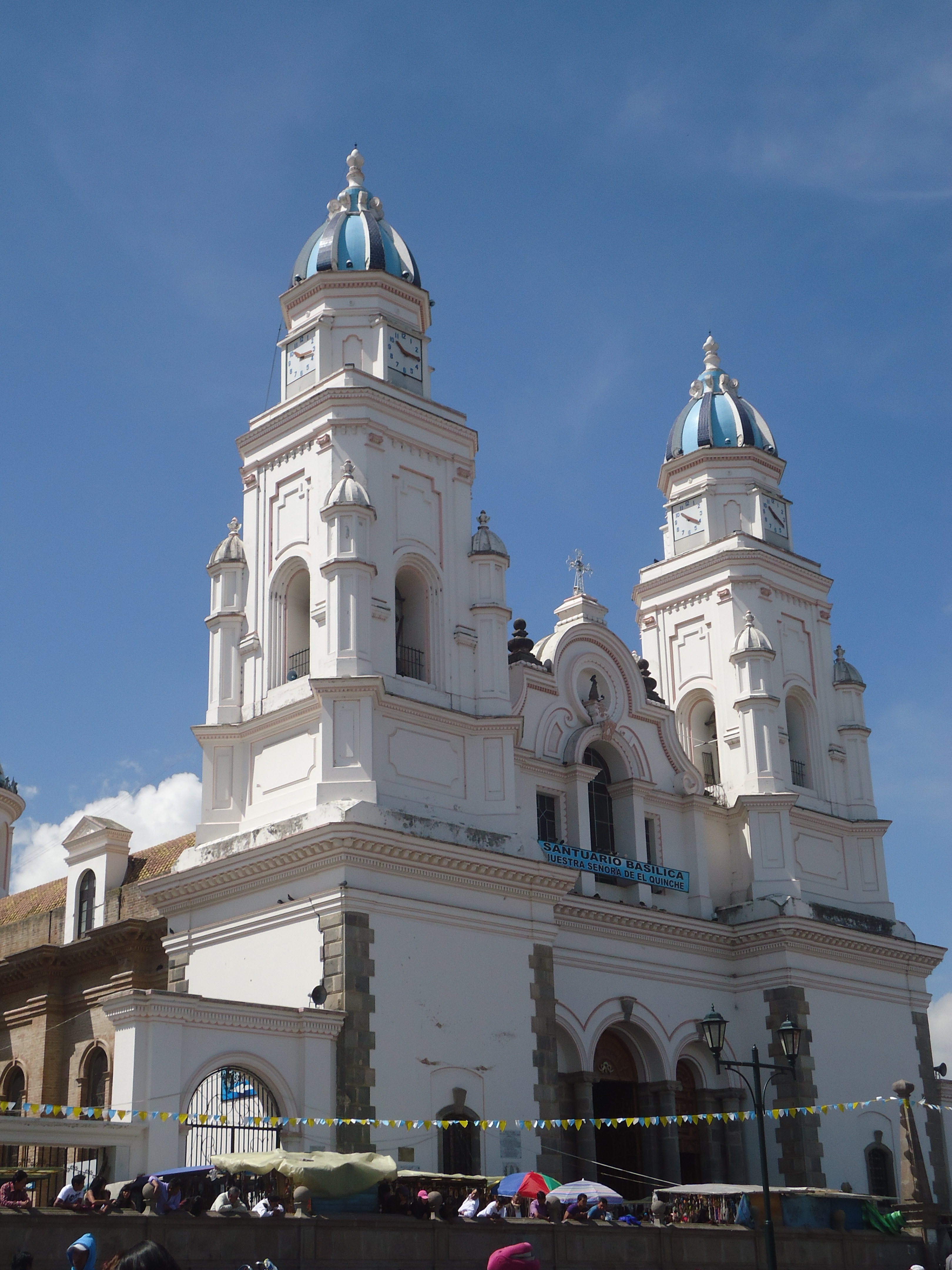 Santuario Nacional de Nuestra Señora de la Presentación de El Quinche, Quito